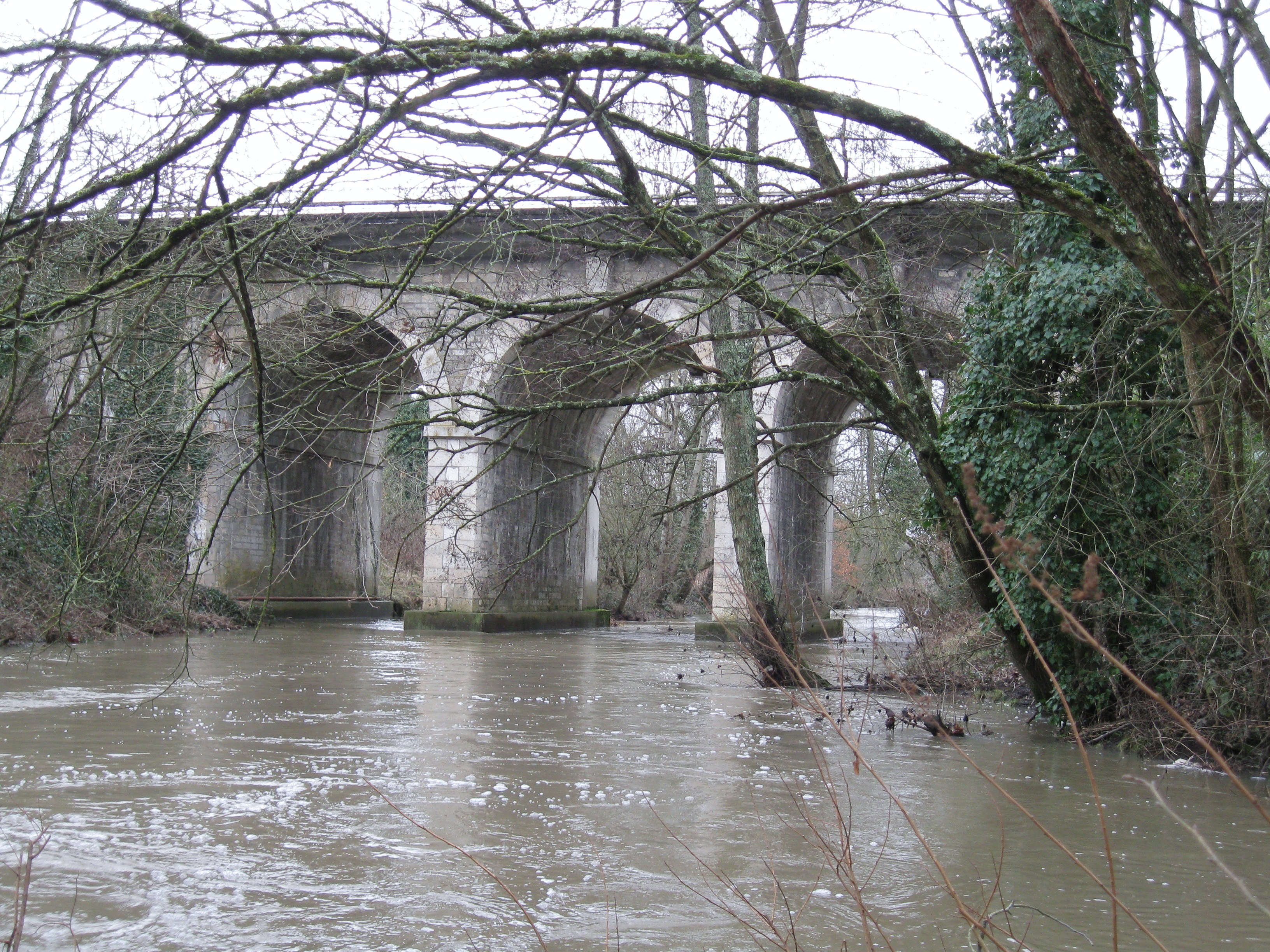 Pont sur le Beuvron de la ligne ferroviaire Orléans-Vierzon, Lamotte-Beuvron, Loir-et-Cher, France